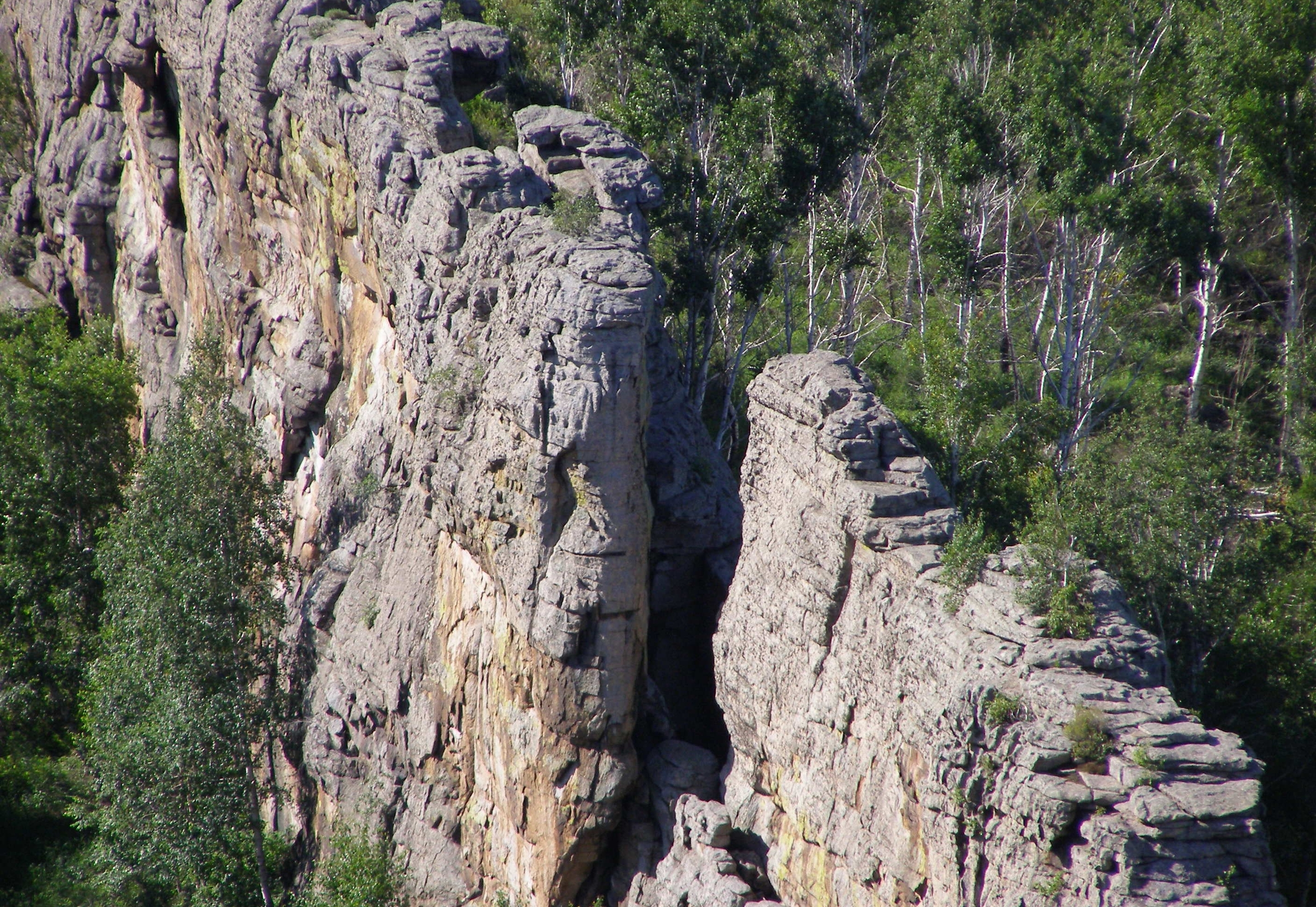 Быркинские скалы с петроглифами: В 5 км южнее села Бырка, Приаргунский район, Забайкальский край This image is related to the protected area of Russia number 7510105